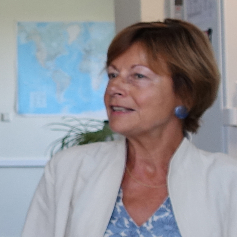 Prof. Dr. rer. nat. Bärbel-Maria Kurth am 31. Mai 2018